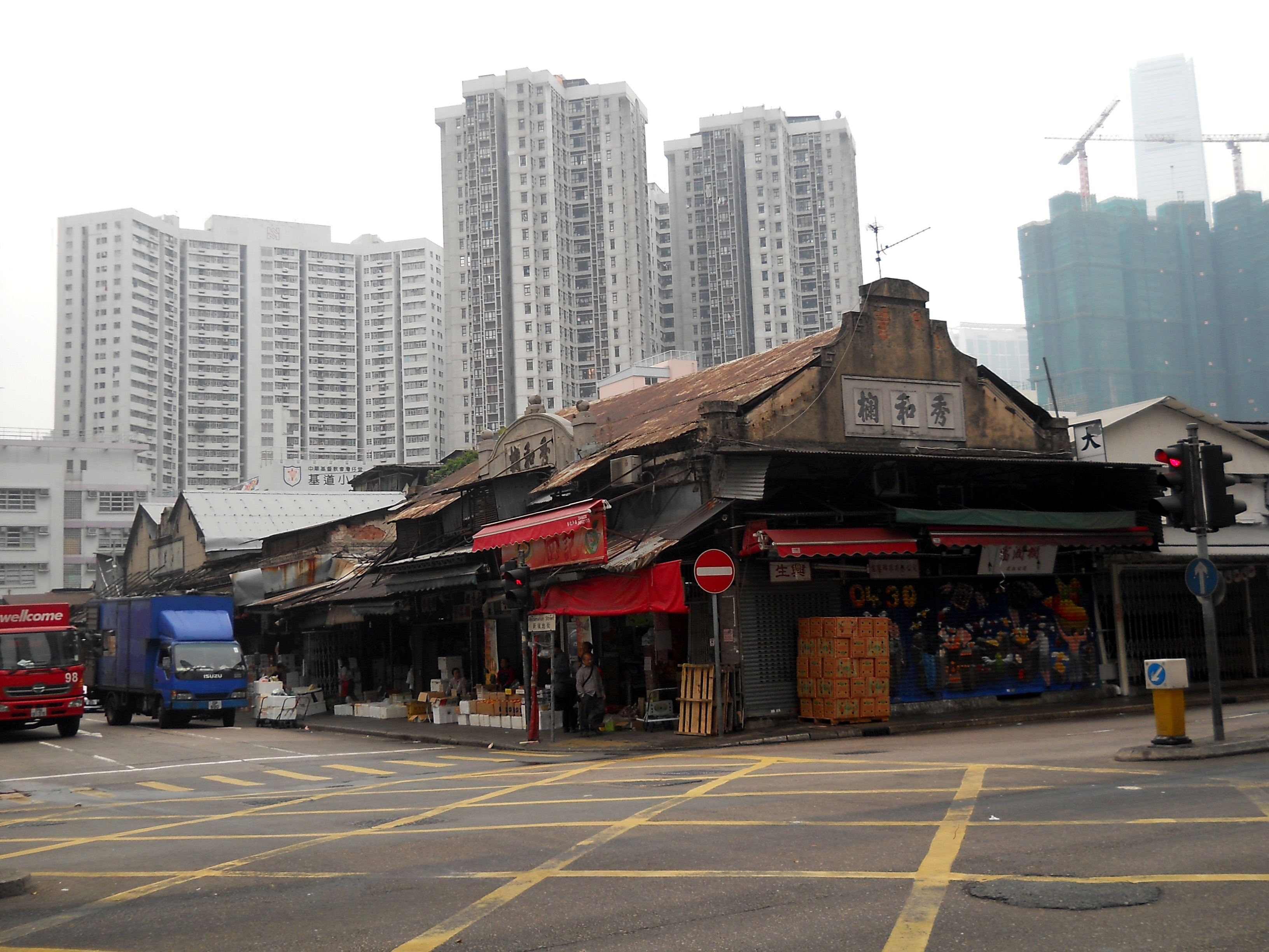 中文（香港）: 油麻地果欄秀和欄